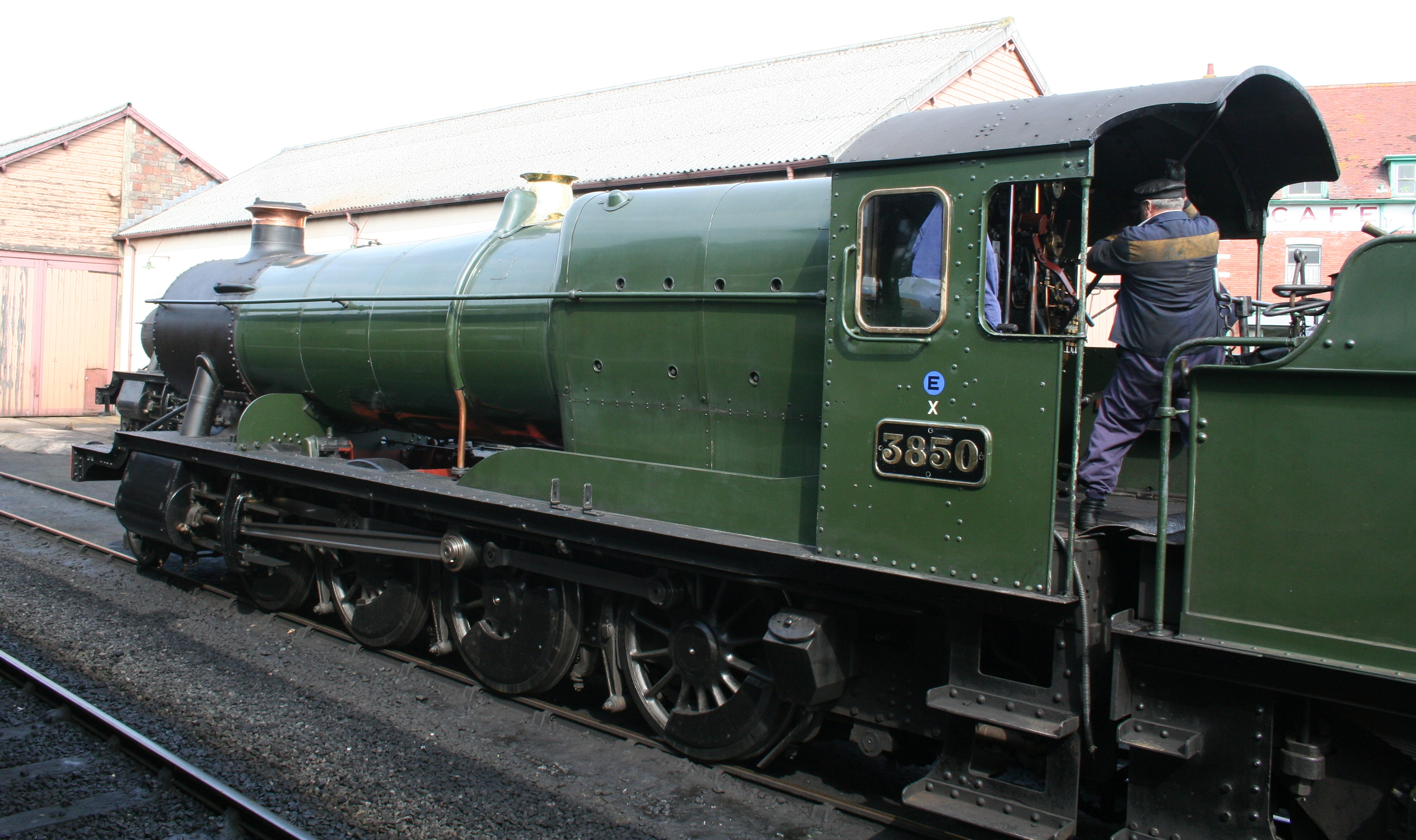 Stoking